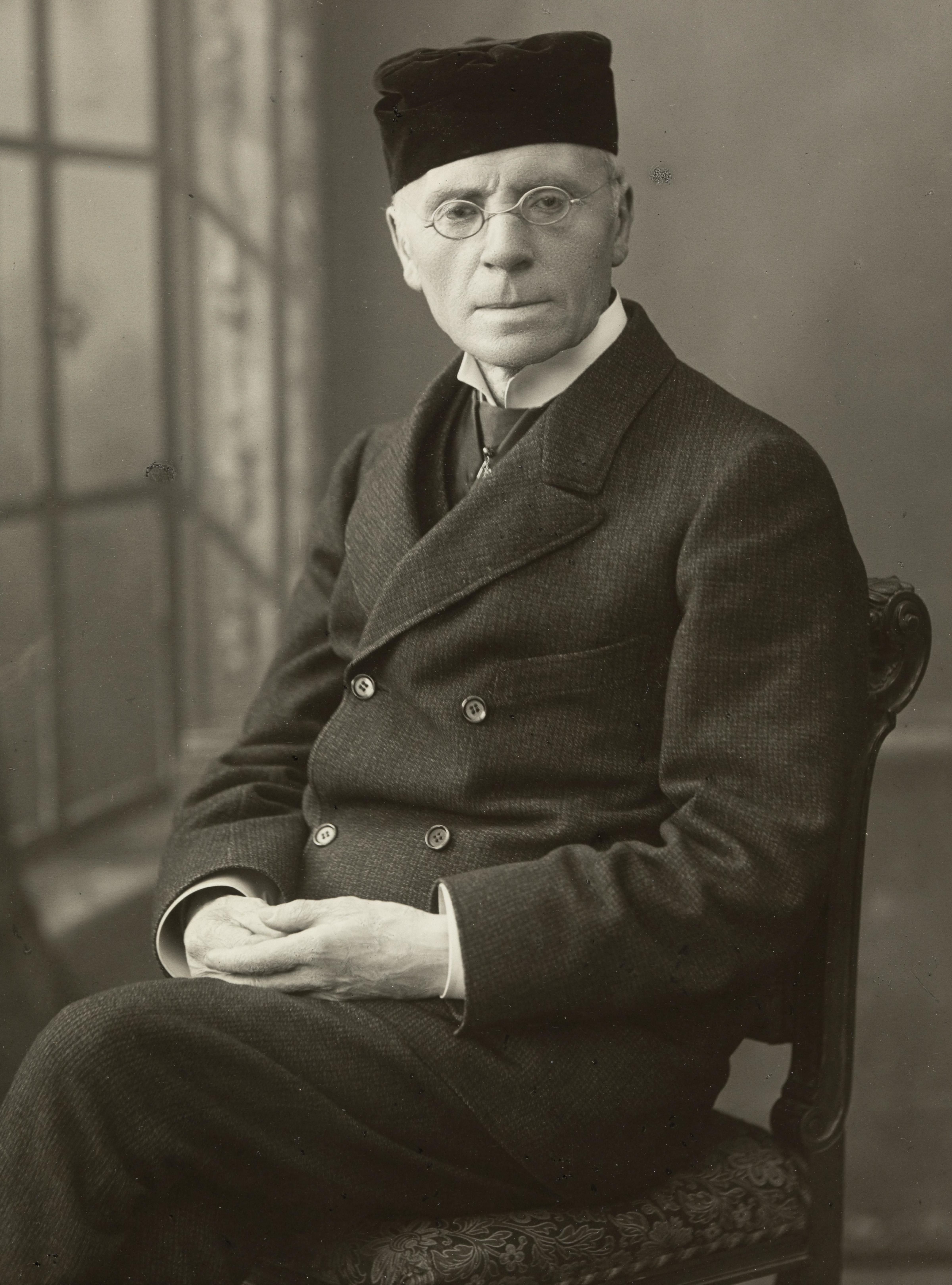 Bildet er hentet fra Nasjonalbibliotekets bildesamling Depicted person: Lie, Jonas